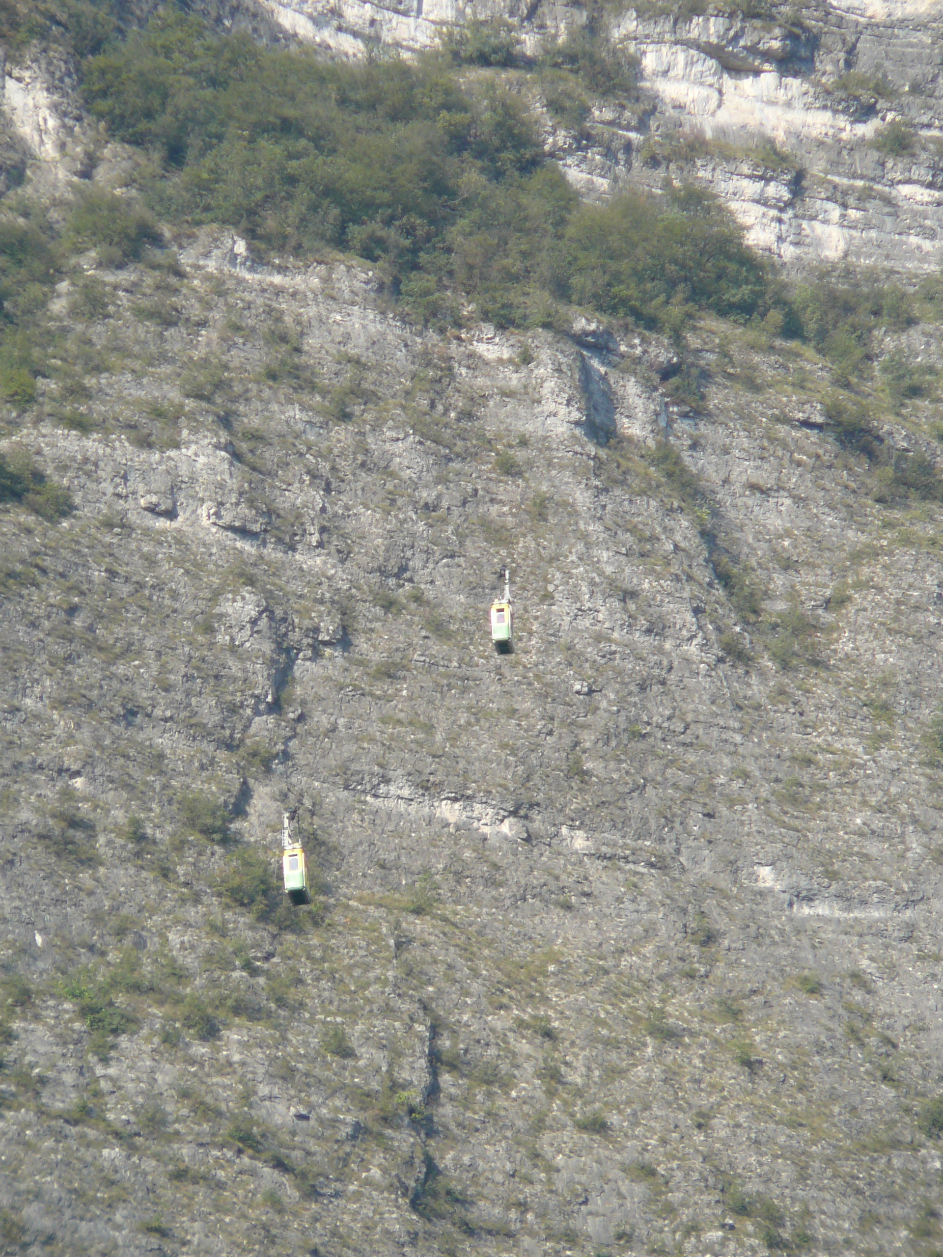 Funivia Mezzocorona-Monte - Le due cabine